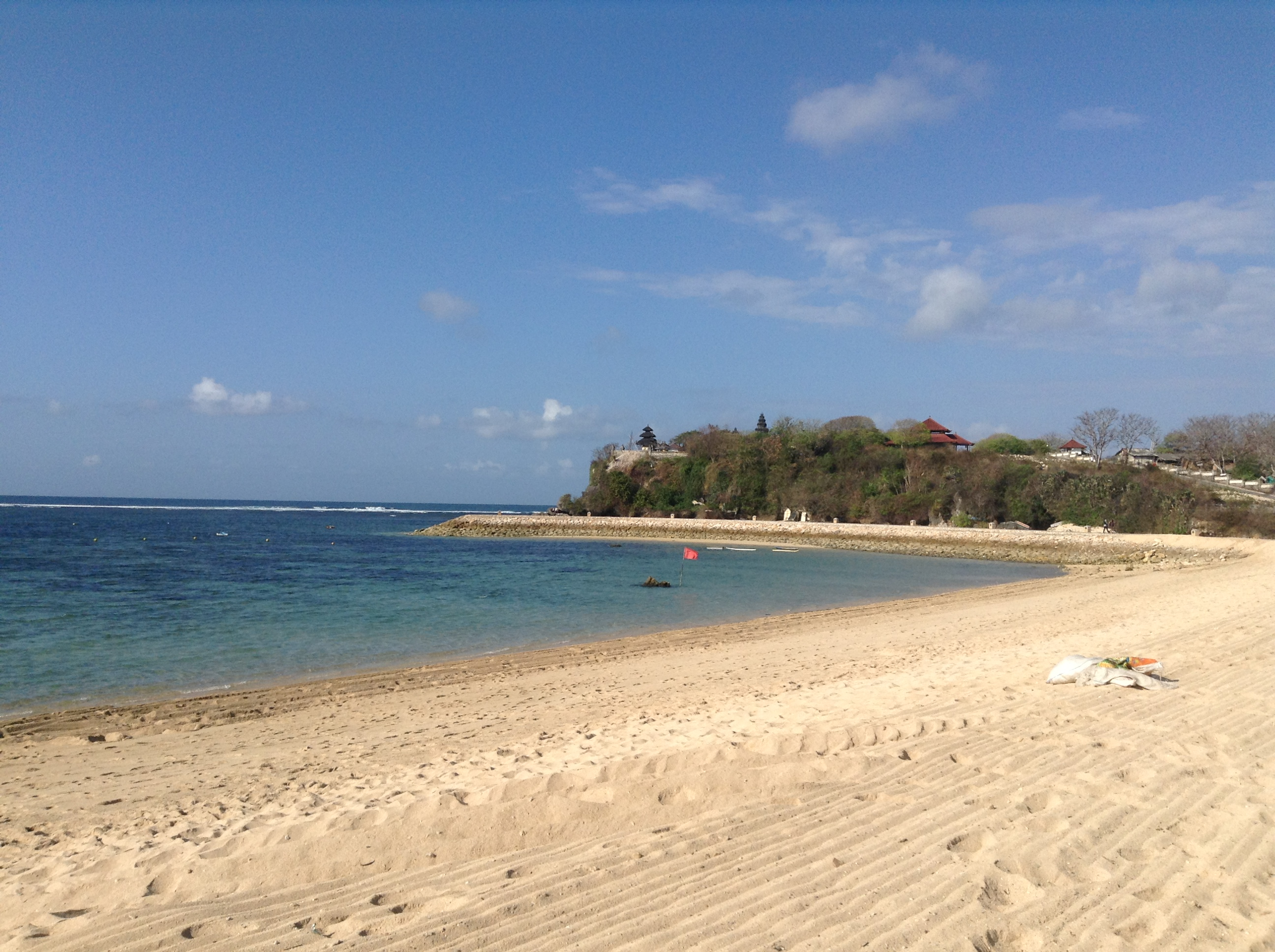 Nusa Dua - Bali